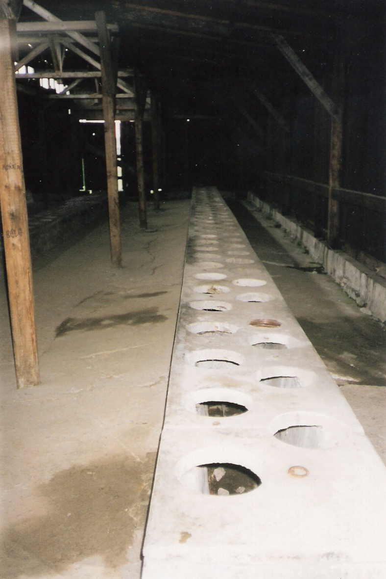 toilets in birkenau, poland